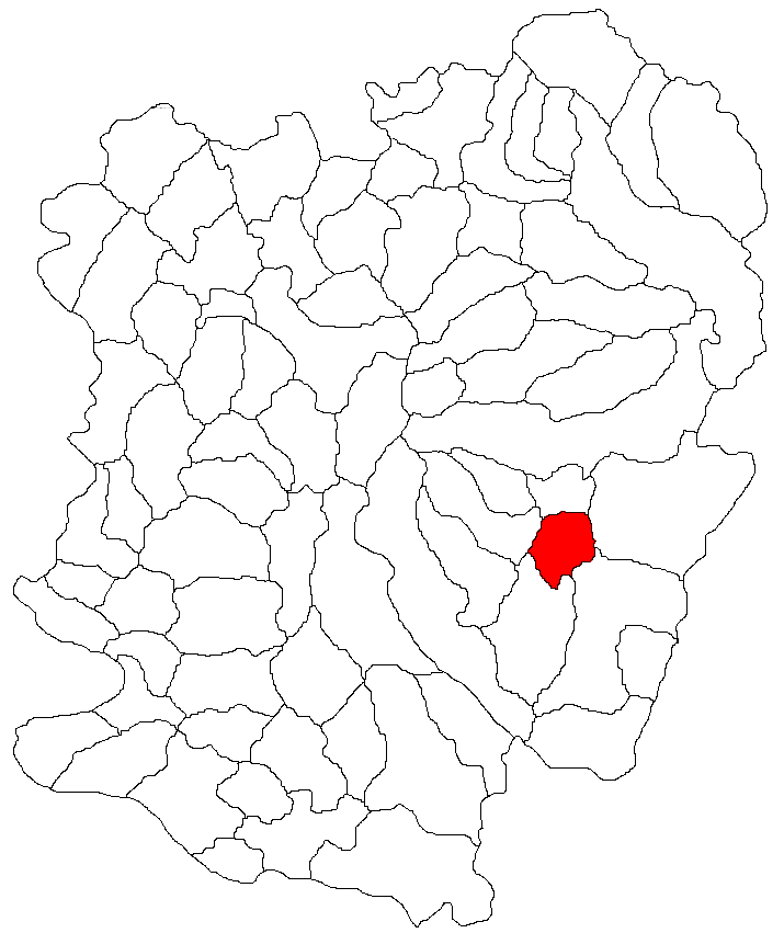 Categorie:Hărţi ale judeţului Caraş-Severin